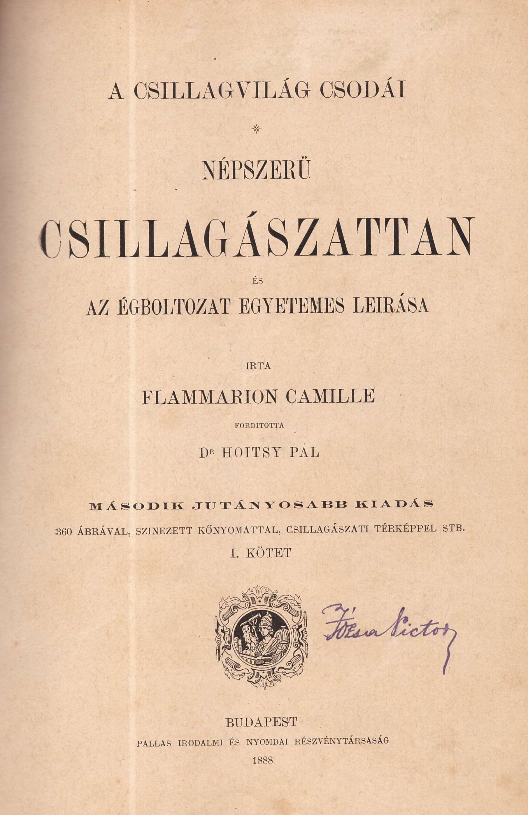 Camille Flammarion (1842-1925): Népszerü csillagászattan (1888)